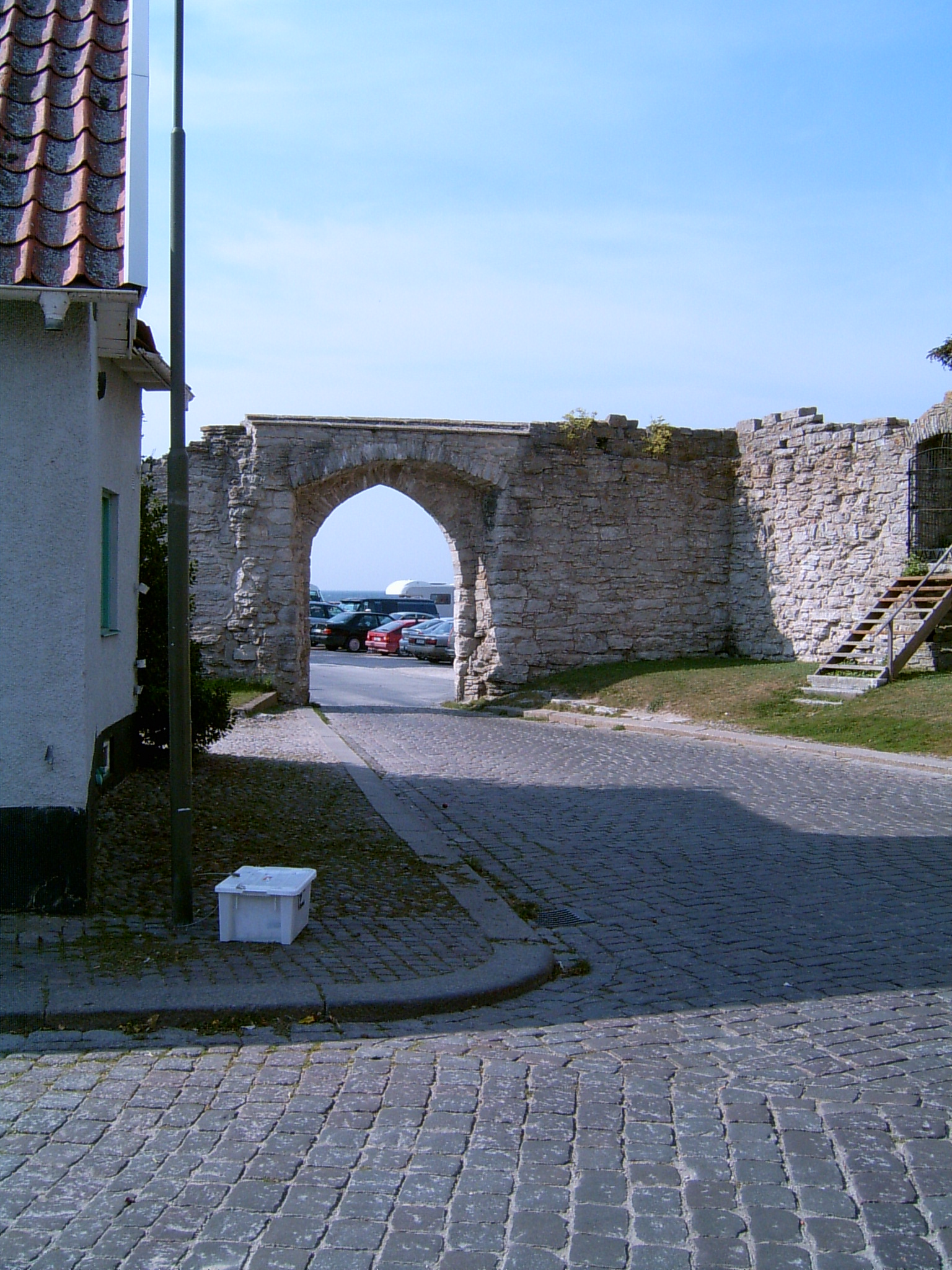 Fiskarporten in Visby.